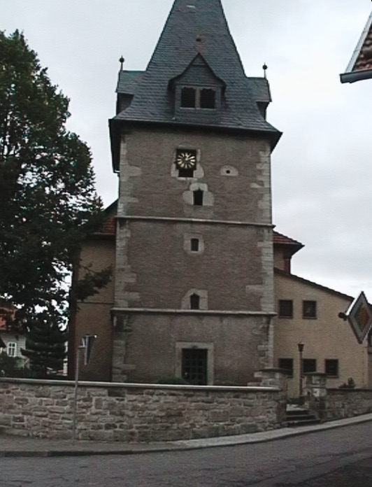 1998 in Großbartloff